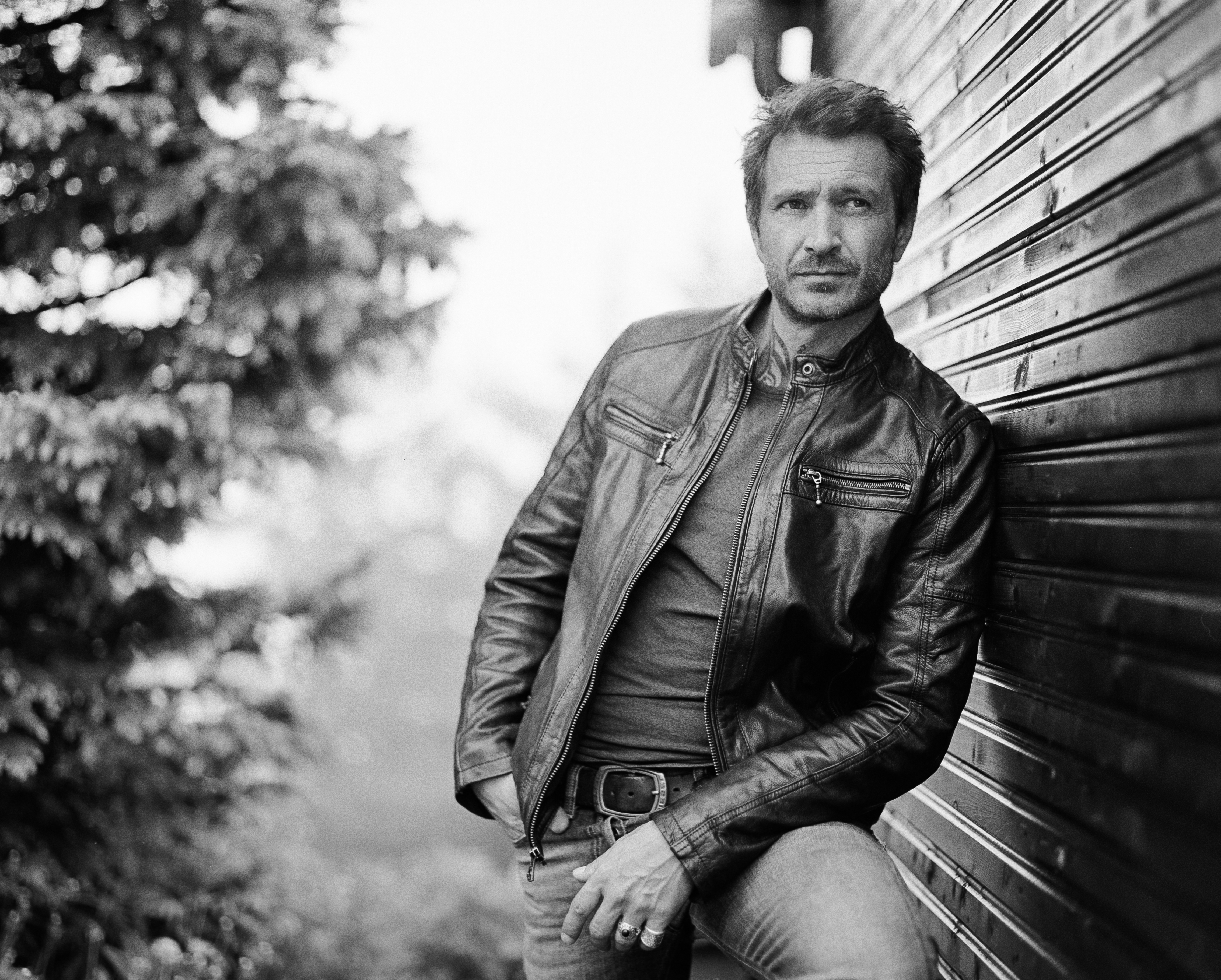 Alexandre Varga sur le tournage de la série Cassandre en juin 2018